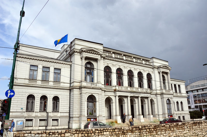 npsa 3